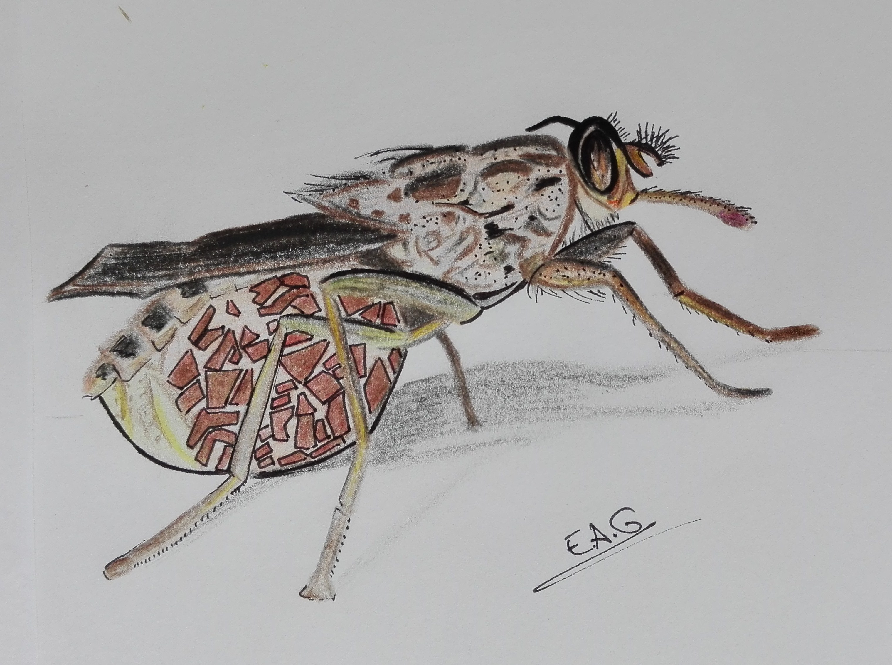 Glossina morsitans morsitans. Mosca tsetse, vector de transmisión de tripamanosomas.